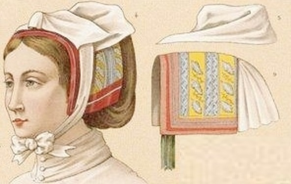 Exemples de coiffes des femmes de la région de Pont-l'Abbé dénommées "bigoudens" : la femme représentée à gauche porte un bigouden de linon, garni de brides nouées sous le menton et posé sur un serre-tête brodé de soie. Derrière, les cheveux sont relevés sous la coiffe. Ainsi encadré par la coiffe et ses brides, le bord du serre-tête qui entoure le visage rappelle la templette de l'époque d'Anne de Bretagne. En haut à droite, est représenté un bigouden de coton, et en bas à droite, une coiffe de coton.